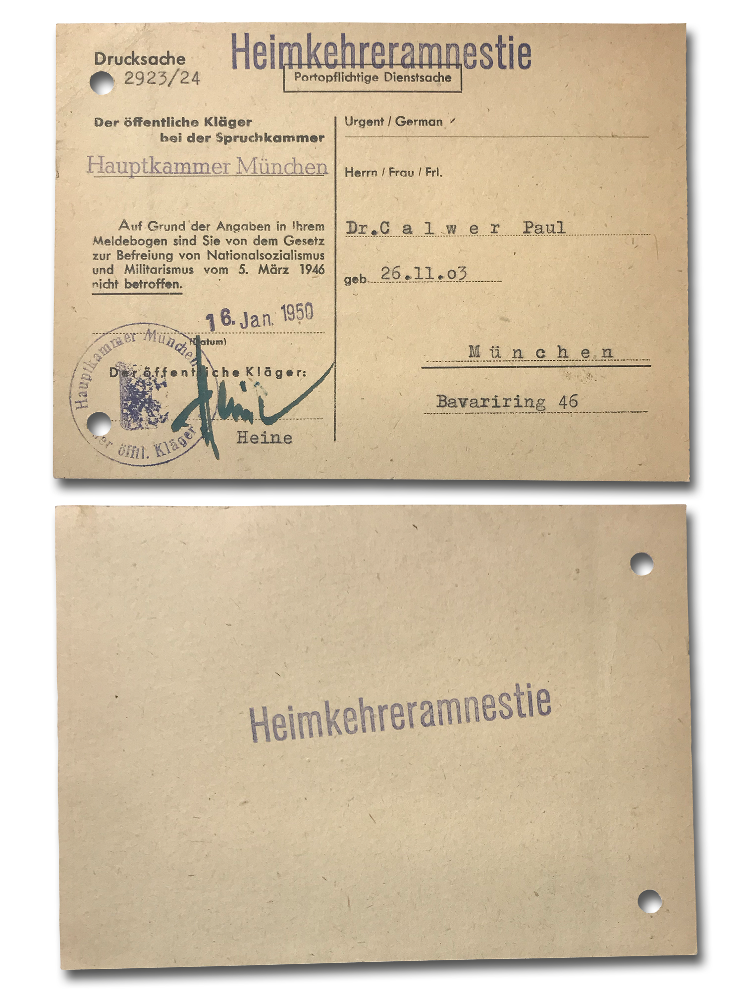 sog. "Persilschein", hier in der Version für Kriegsgefangene als "Heimkehreramnestie"